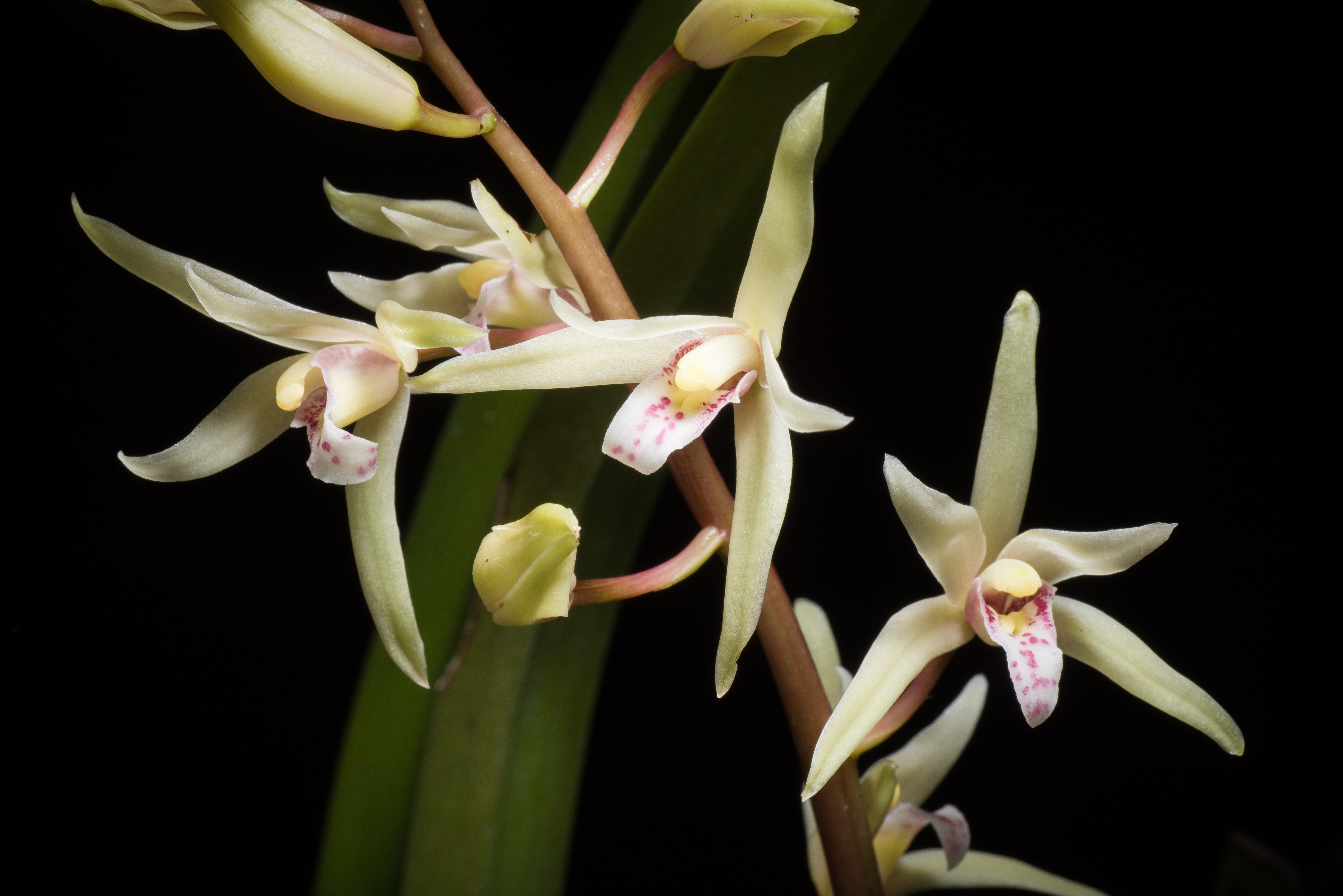 Cymbidium aliciae - (Philippines)